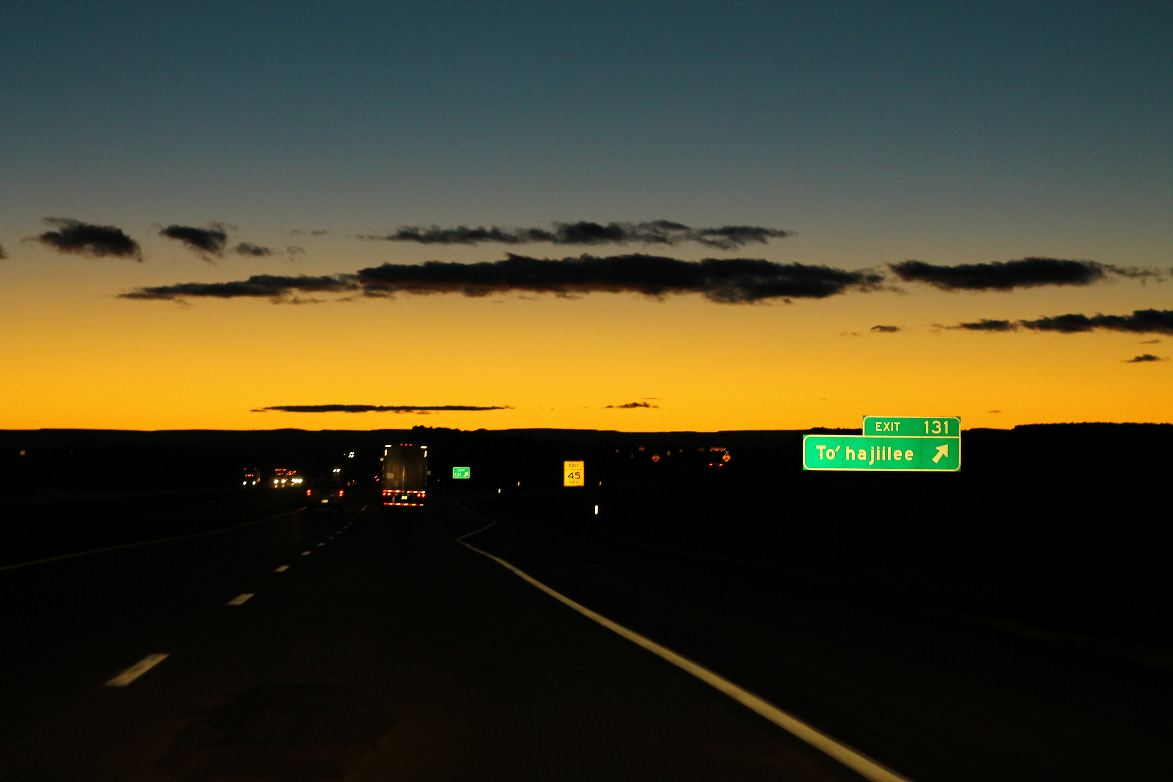 I-40 West: Exit 131 - To'hajiilee